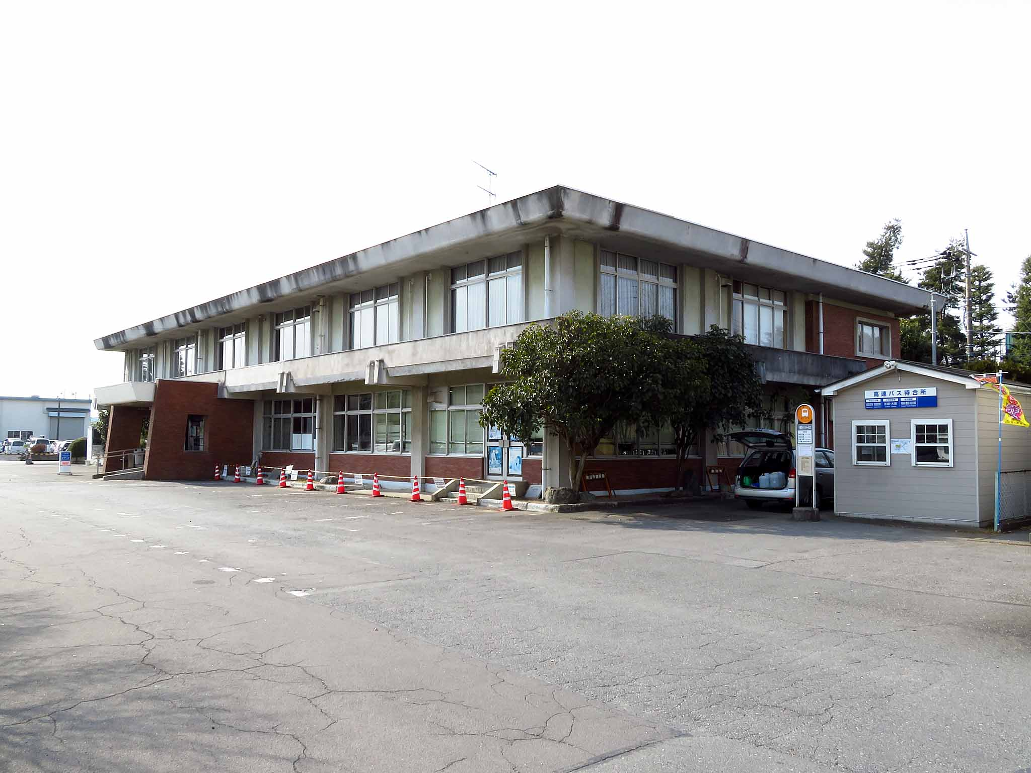 鹿沼市北犬飼コミュニティセンターの外観。敷地内に関東自動車の鹿沼インター入口停留所と待合所が設置されている。